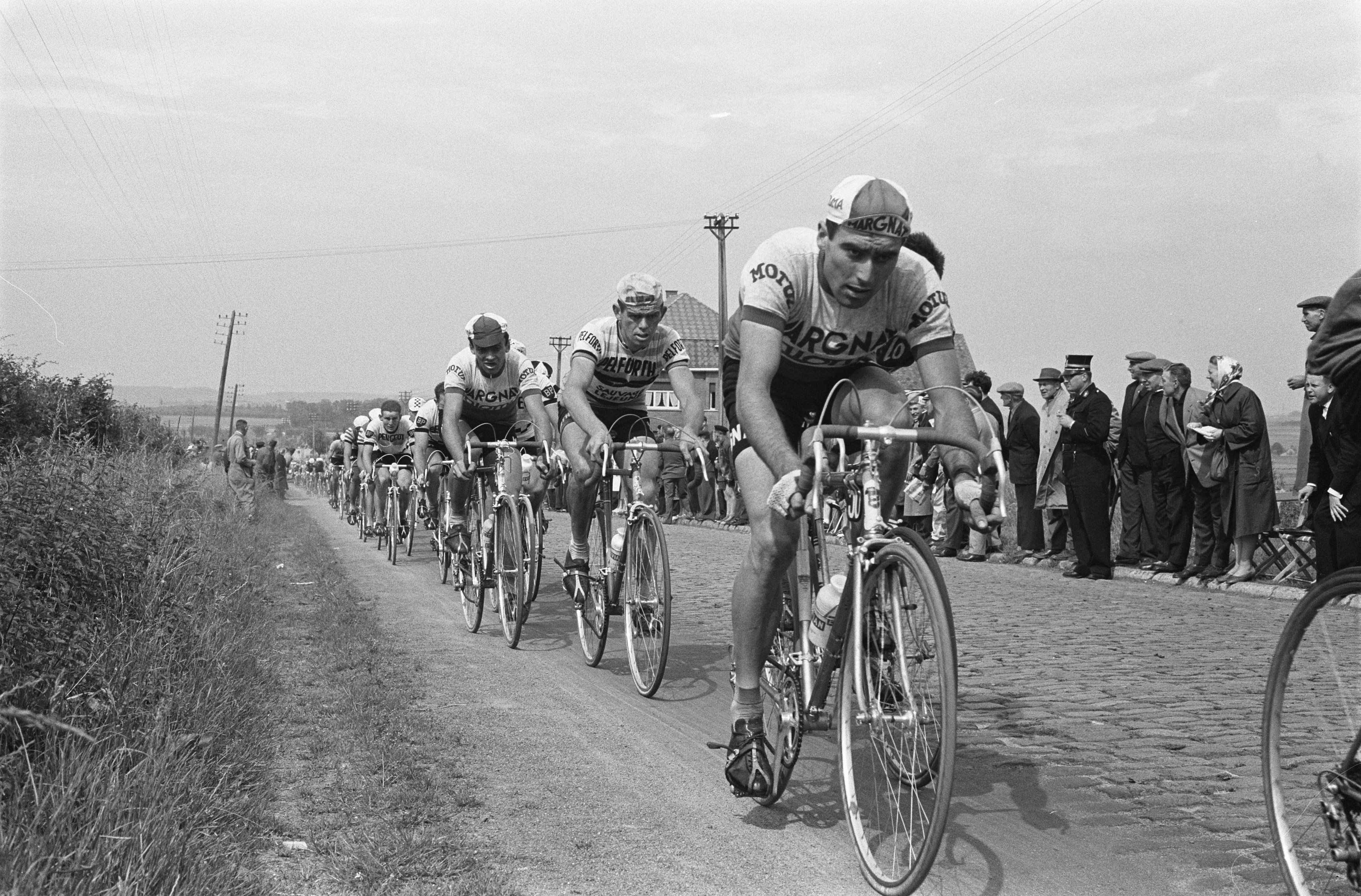 Tour de France. Tijdens de 4e etappe Roubaix-Rouen, het rennersveld.